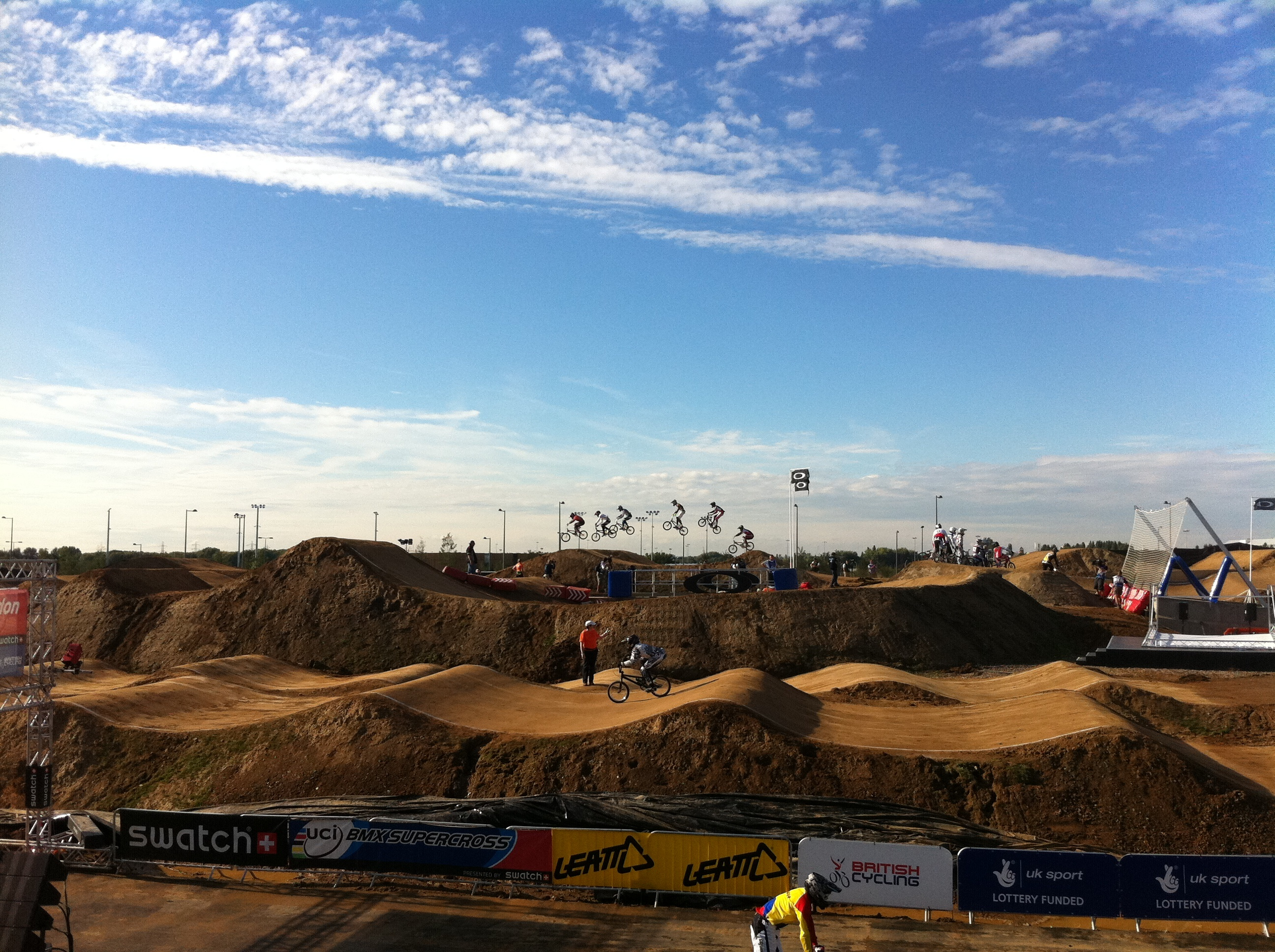 Multi-BMX aero action